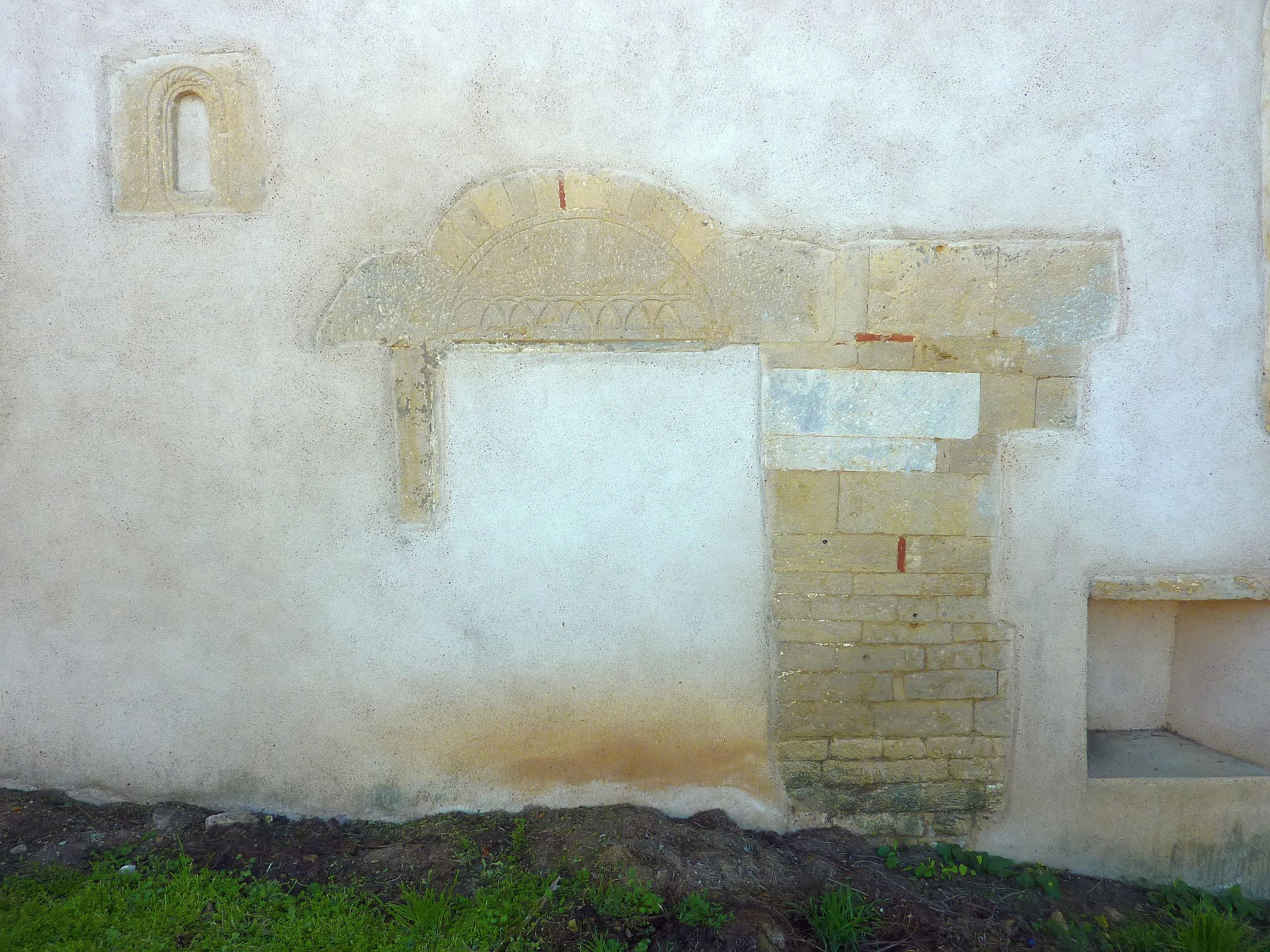 Église St-Gorgon de Ville-sur-Yron